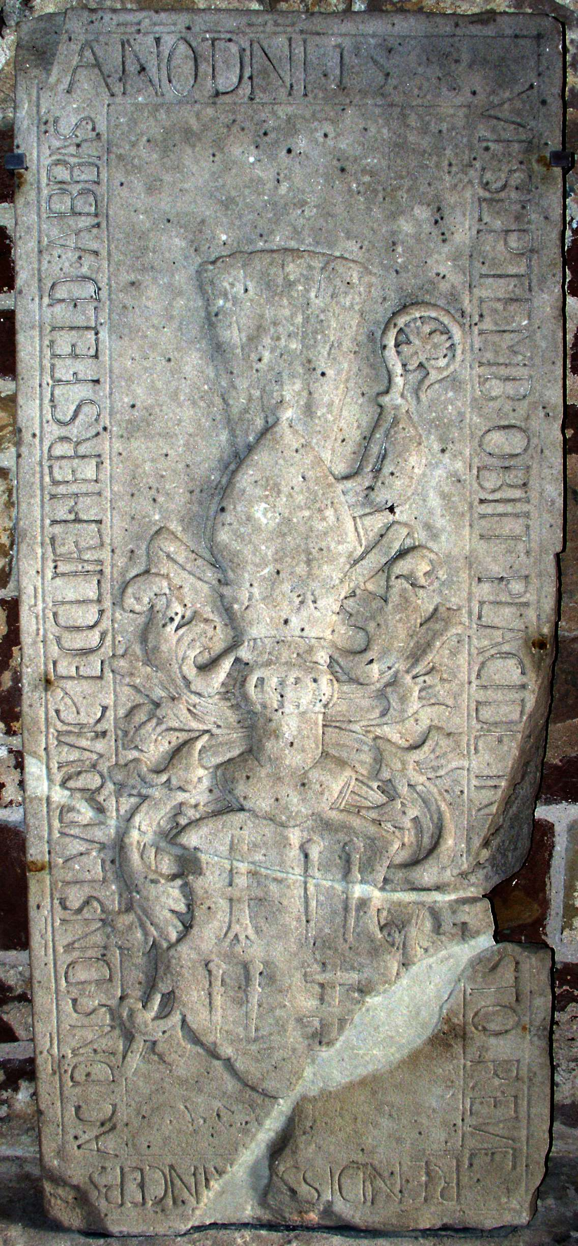 Grabplatte von Abt Ludwig V. (1571 - 1588), einzige erhaltene Grabplatte eines Hersfelder Abtes. Sie steht heute im Eingangsbereich der Stiftsruine